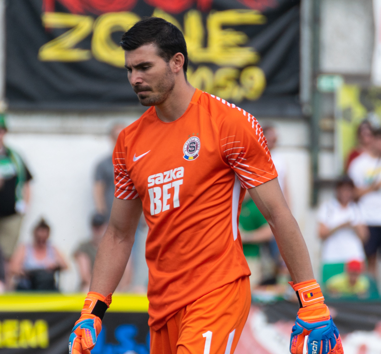 Florin Niță vs Bohemians Praha 1905